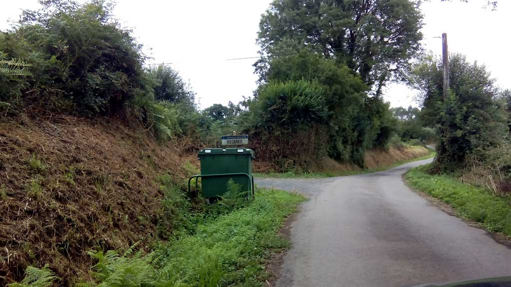 Vista de Recareo, Curtis.